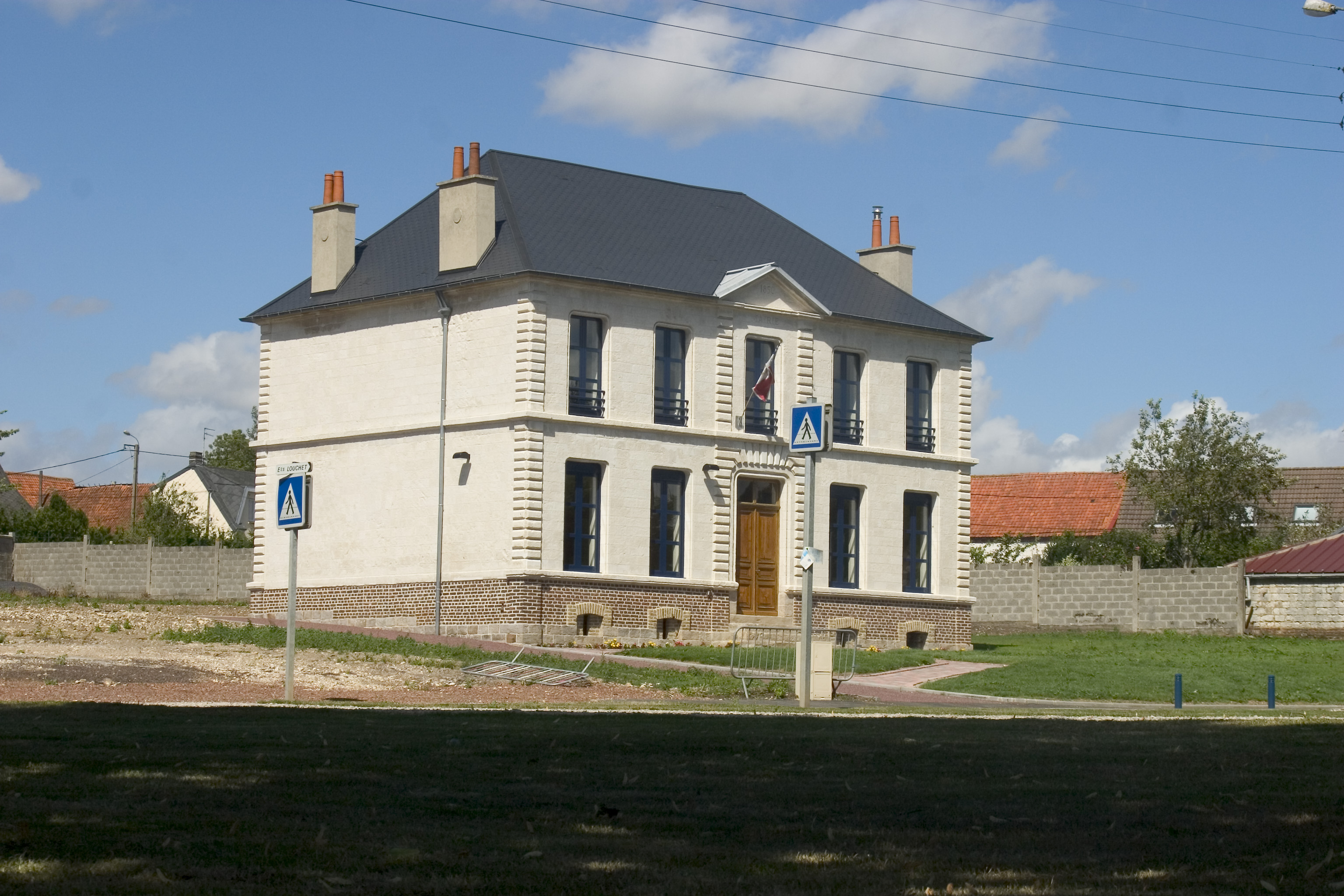 Le nouveau bâtiment communal de Cambligneul (Pas-de-Calais, France), faisant office de mairie.